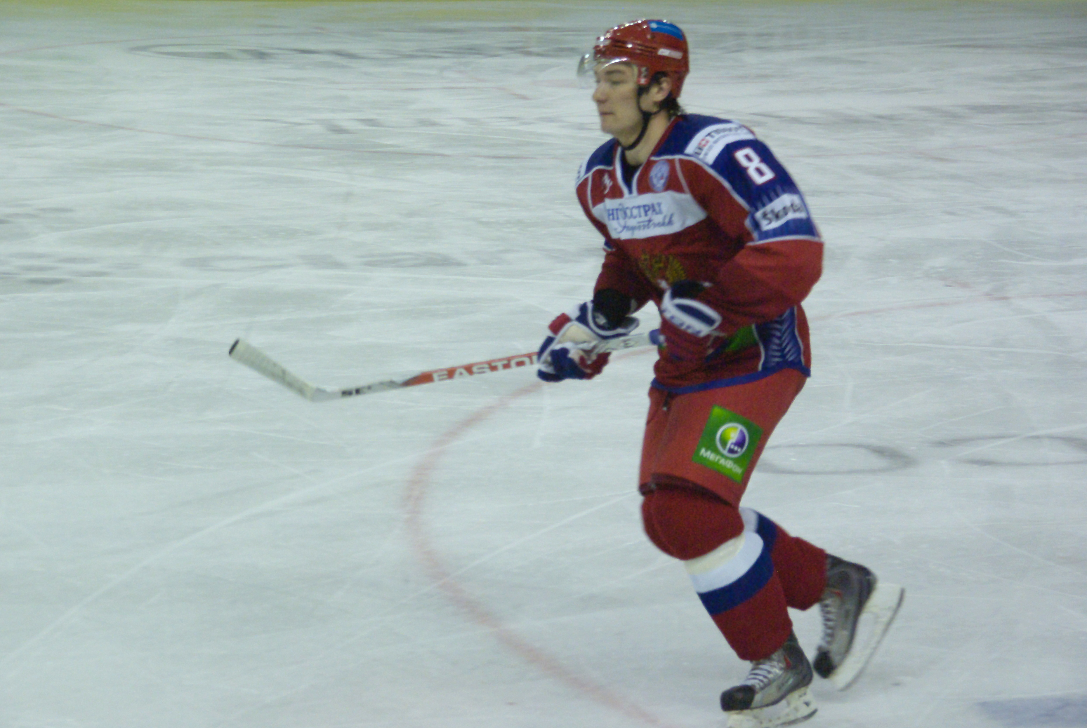 Marat Kalimulin podczas meczu Rosja B - Ukraina (turniej EIHC w Sanoku)